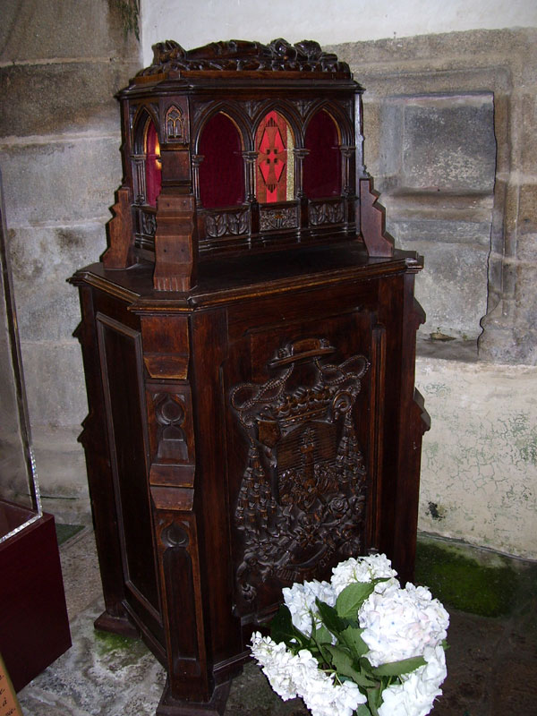 Gras-Gwengamp. Iliz. Arc'h-relegoù Charlez Bleaz.